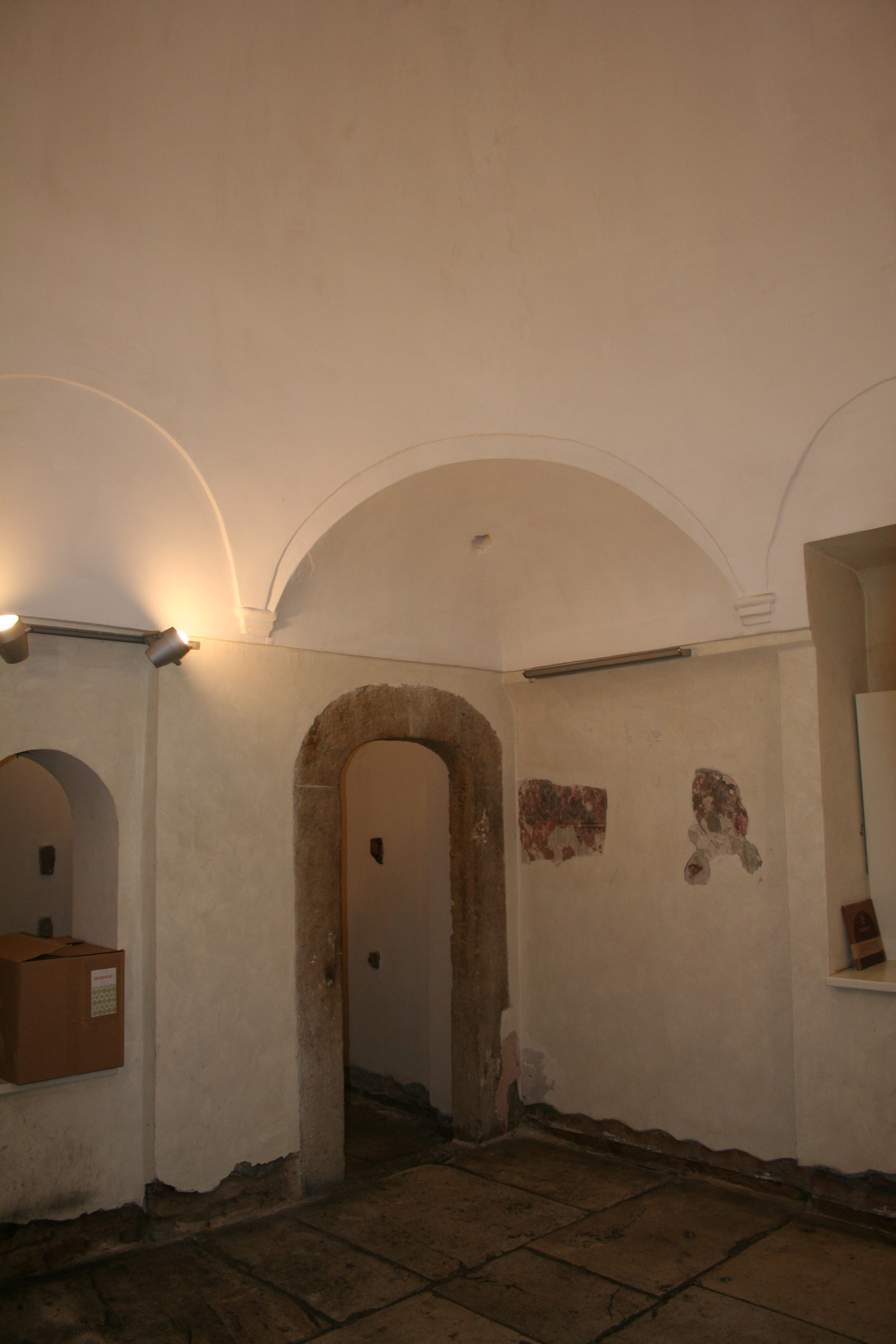 Amam kneza Miloša u Beogradu